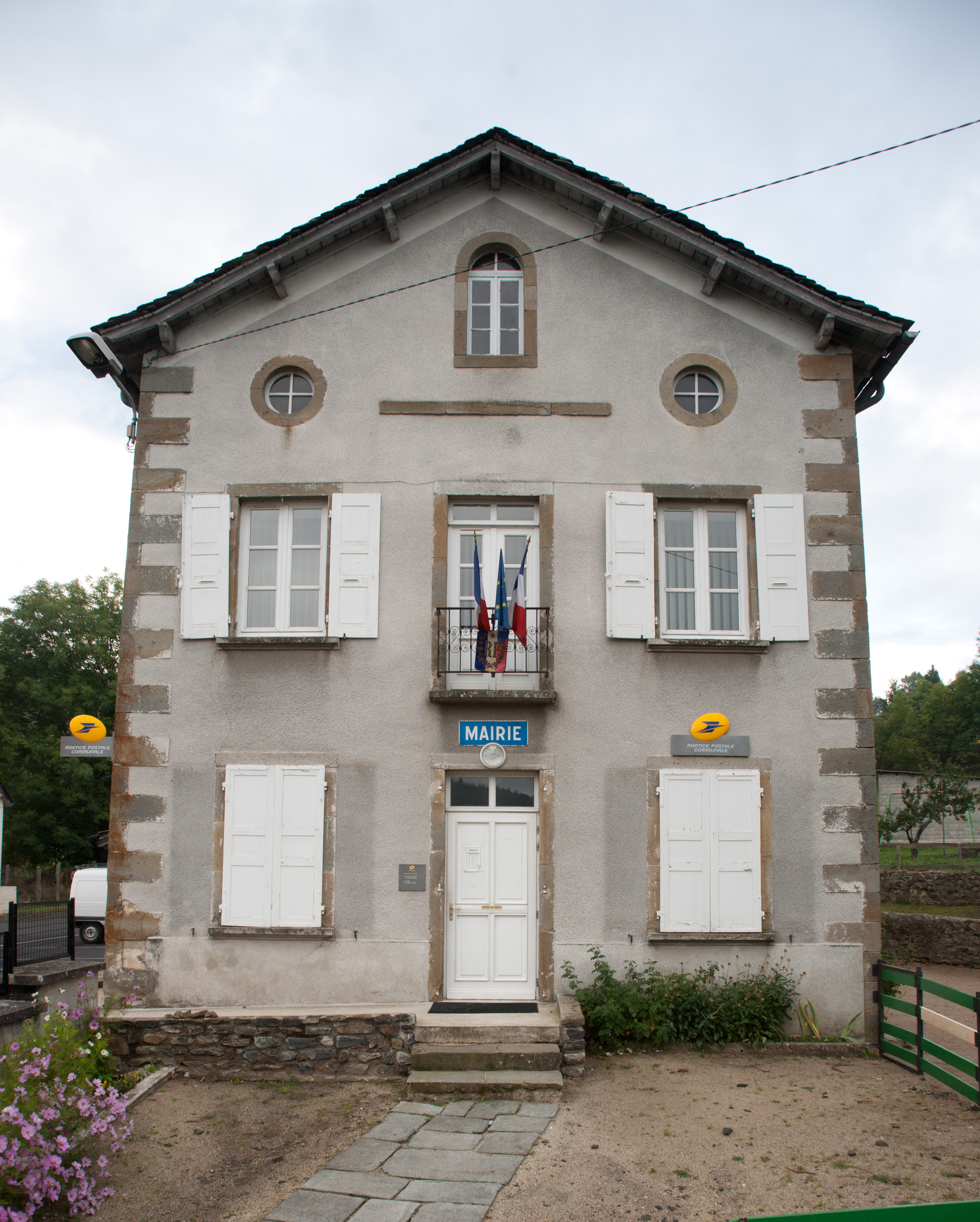 Mairie de la commune de Saint-Hostien, Haute-Loire, France.